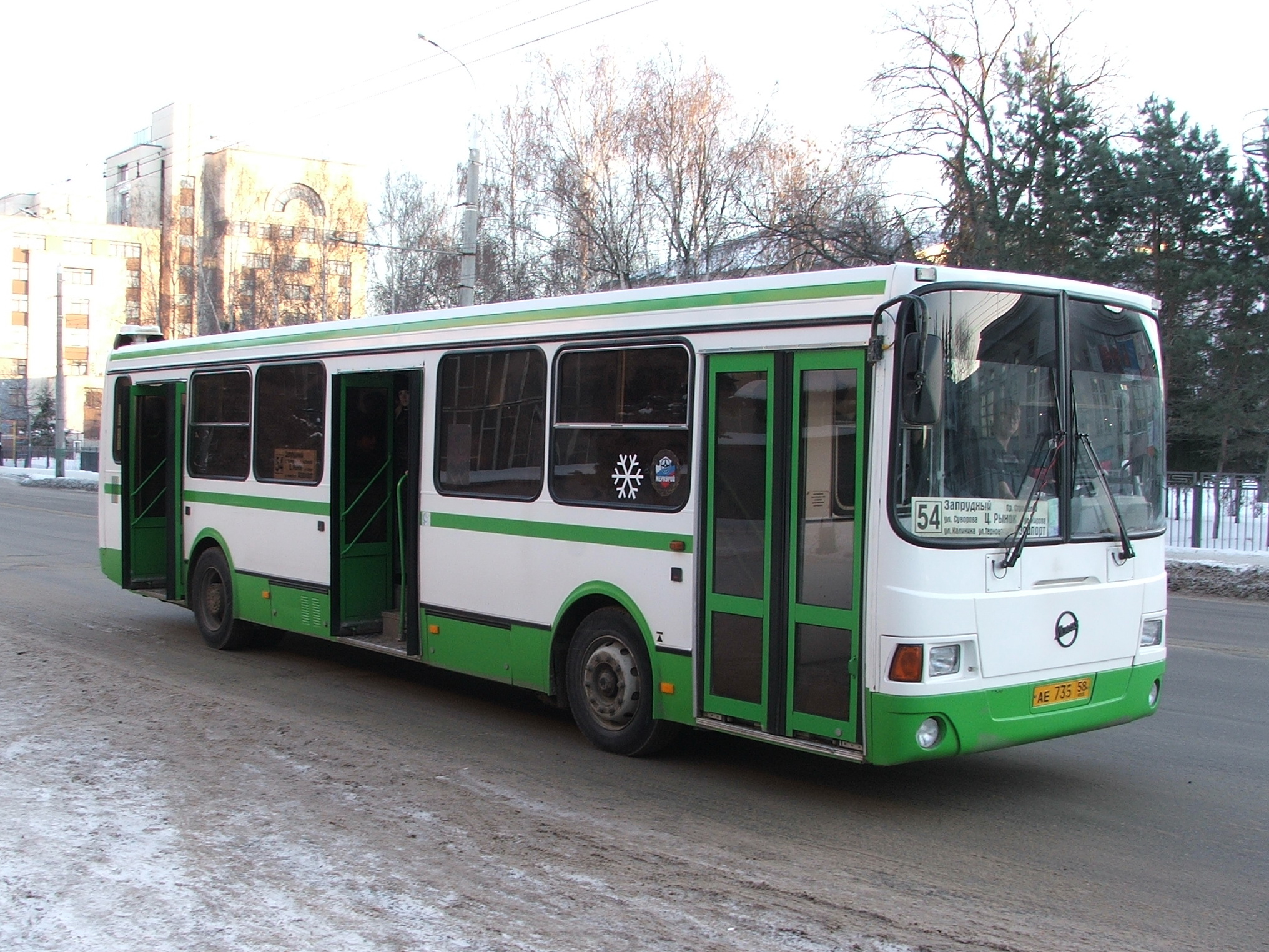 Автобус ЛиАЗ-5256.45 2006 года выпуска на улице Суворова в г. Пензе.